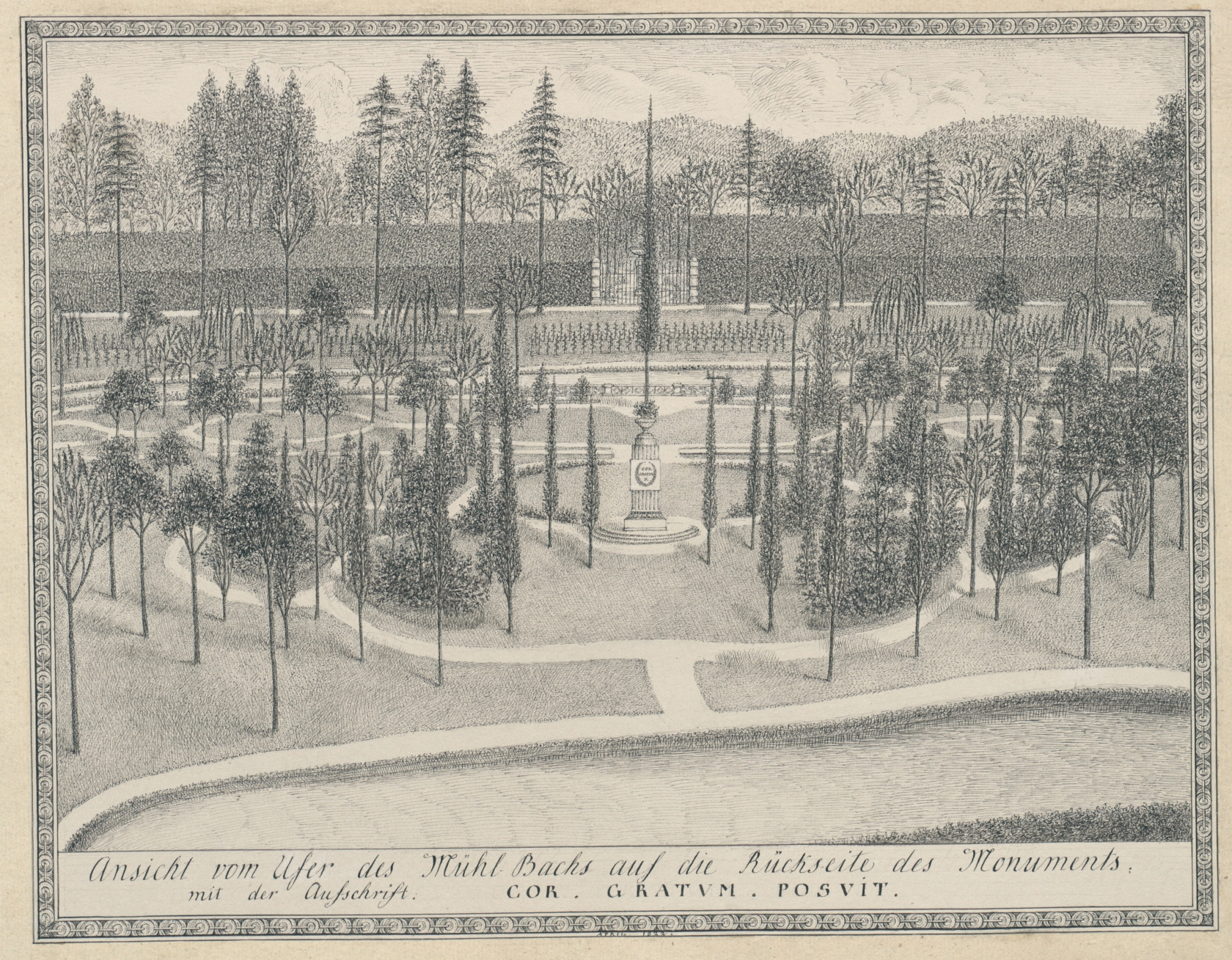 Dol pri Ljubljani